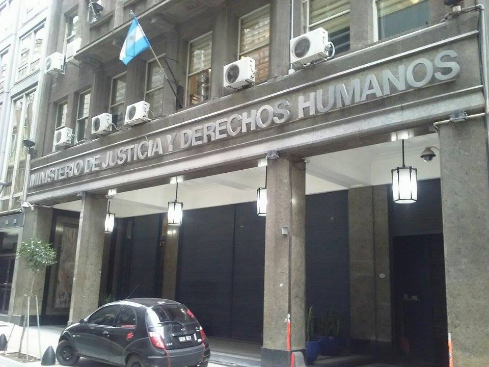 En esta imágen se puede observar el frente del Ministerio ubicado en Sarmiento 329. Ciudad de Buenos Aires